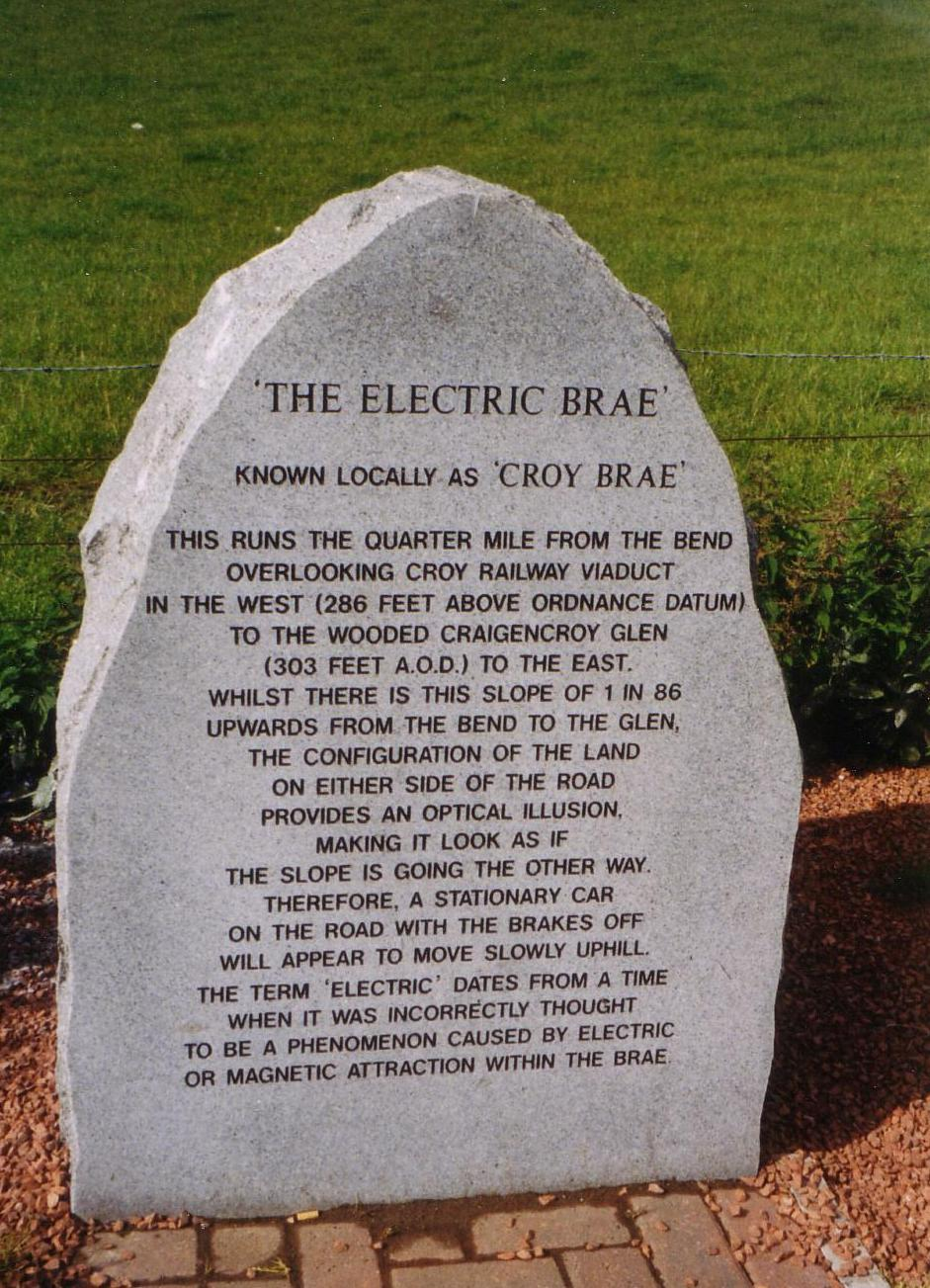 Electric Brae Cairn, Schottland